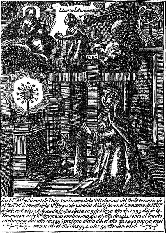 Santa Juan de la Cruz. Ilustración de Antonio Daza, "Historia, vida y milagros, éxtasis y revelaciones de […] santa Juana de la Cruz", Madrid, Luis Sánchez, 1610.